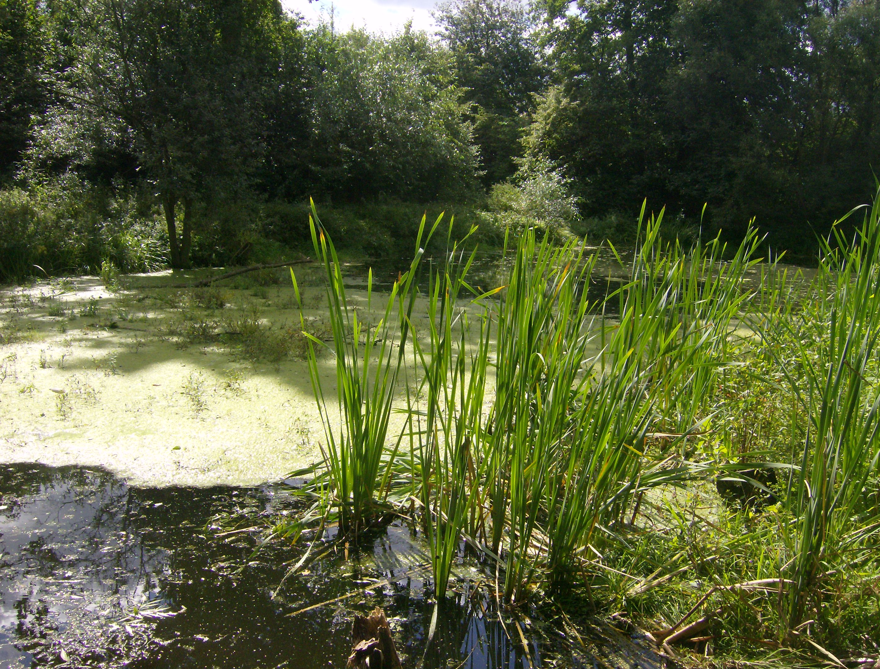 Oczko wodne na terenie planowanym pod skwer - Dąbrowa, Kielce